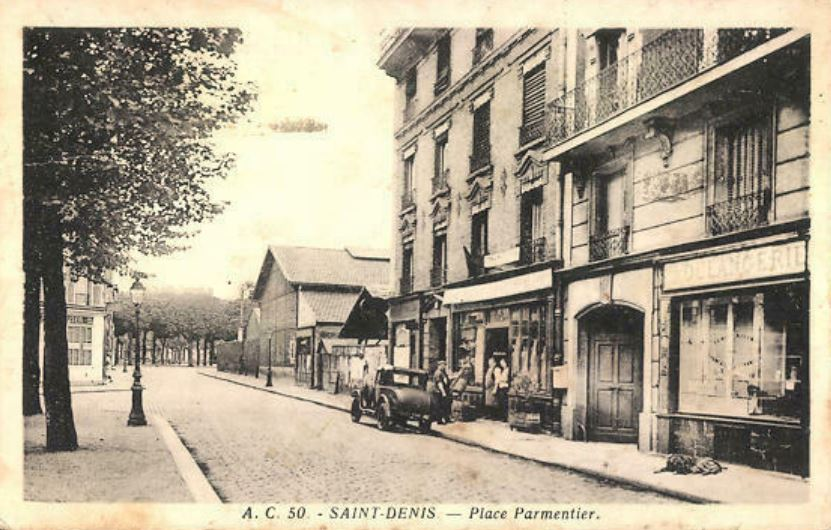 Saint-Denis.Place Parmentier.Voiture